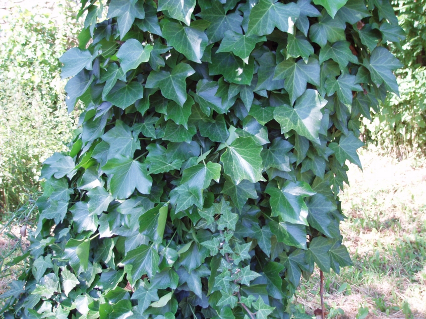 Lierre sur un arbre. Sous gfdl Utilisateur:Joan-T juin 2005